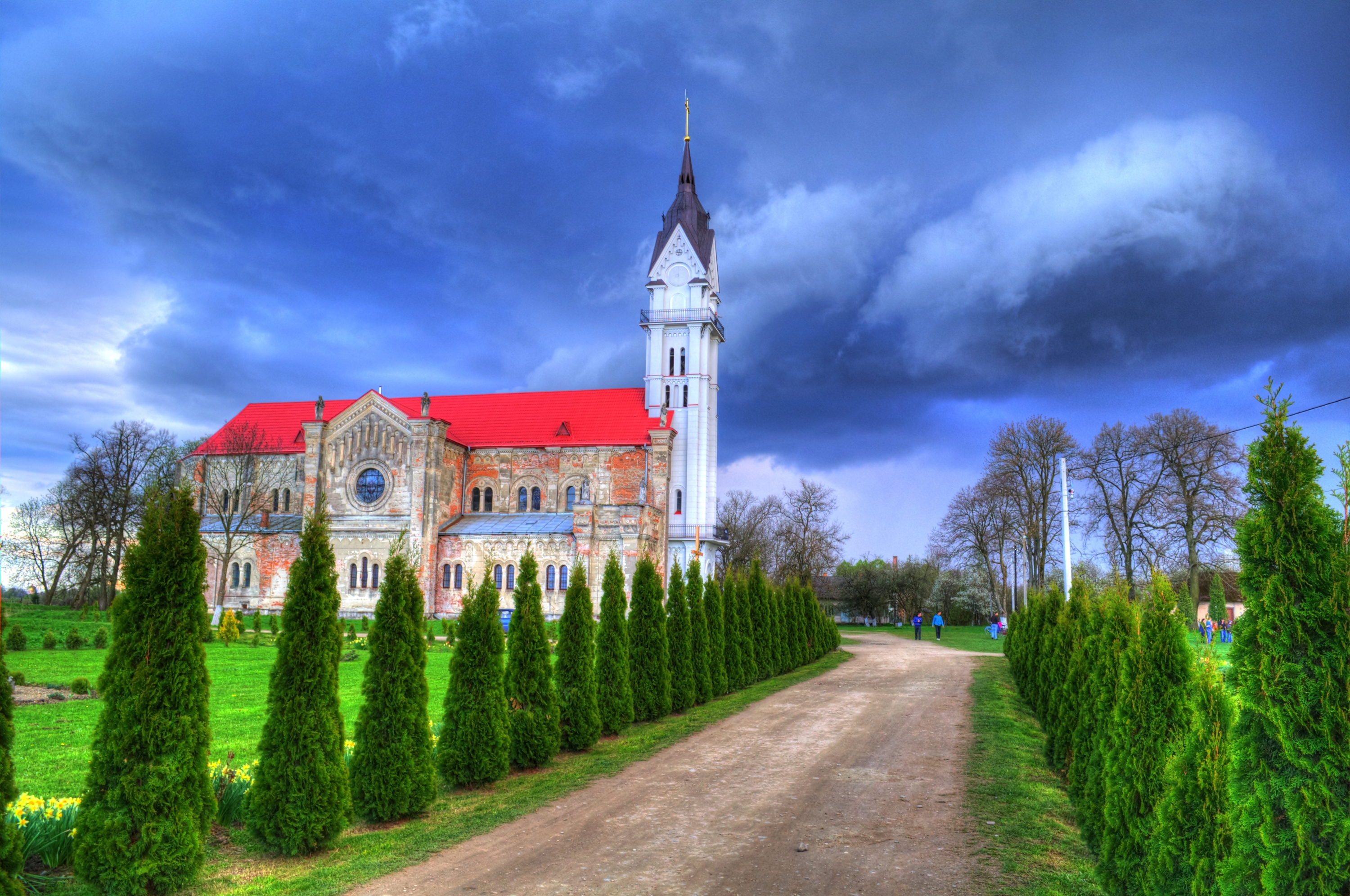 Костел 1894 року